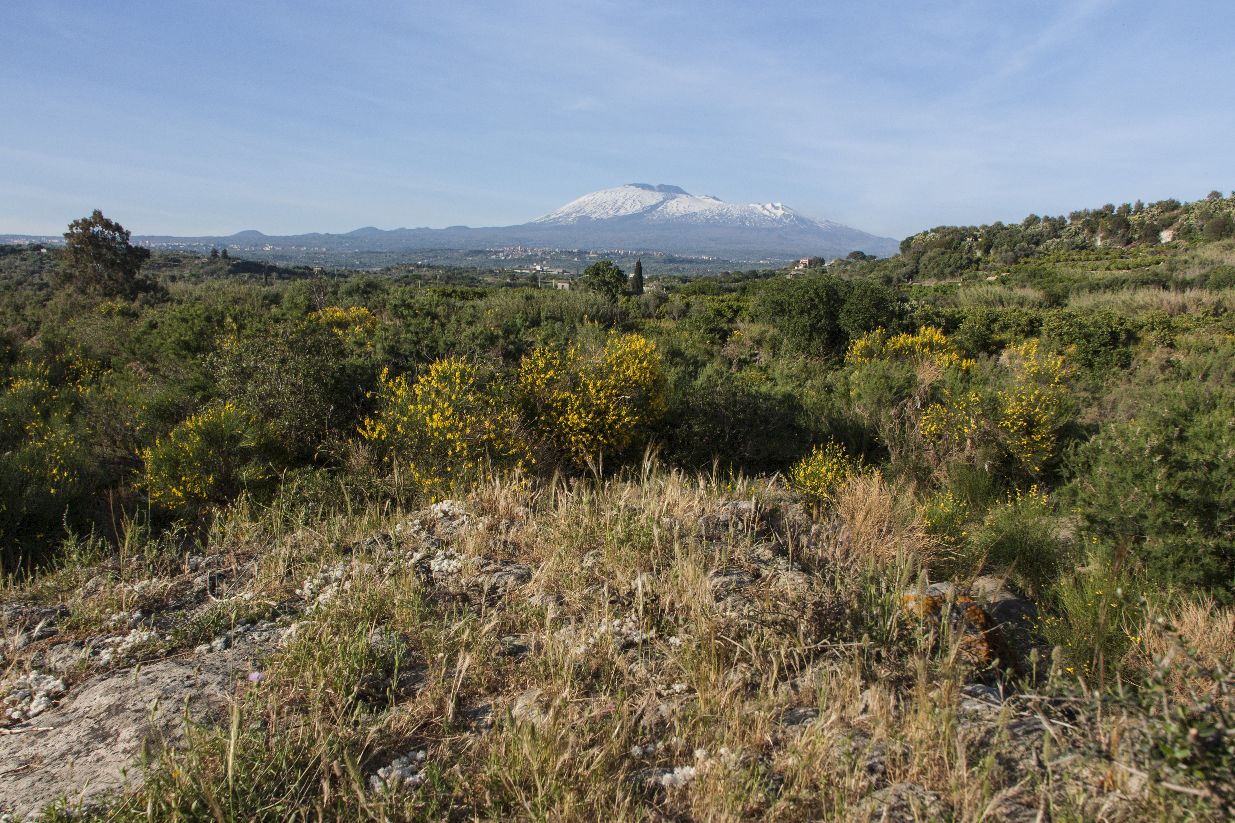 Veduta dell'Etna dal ponte